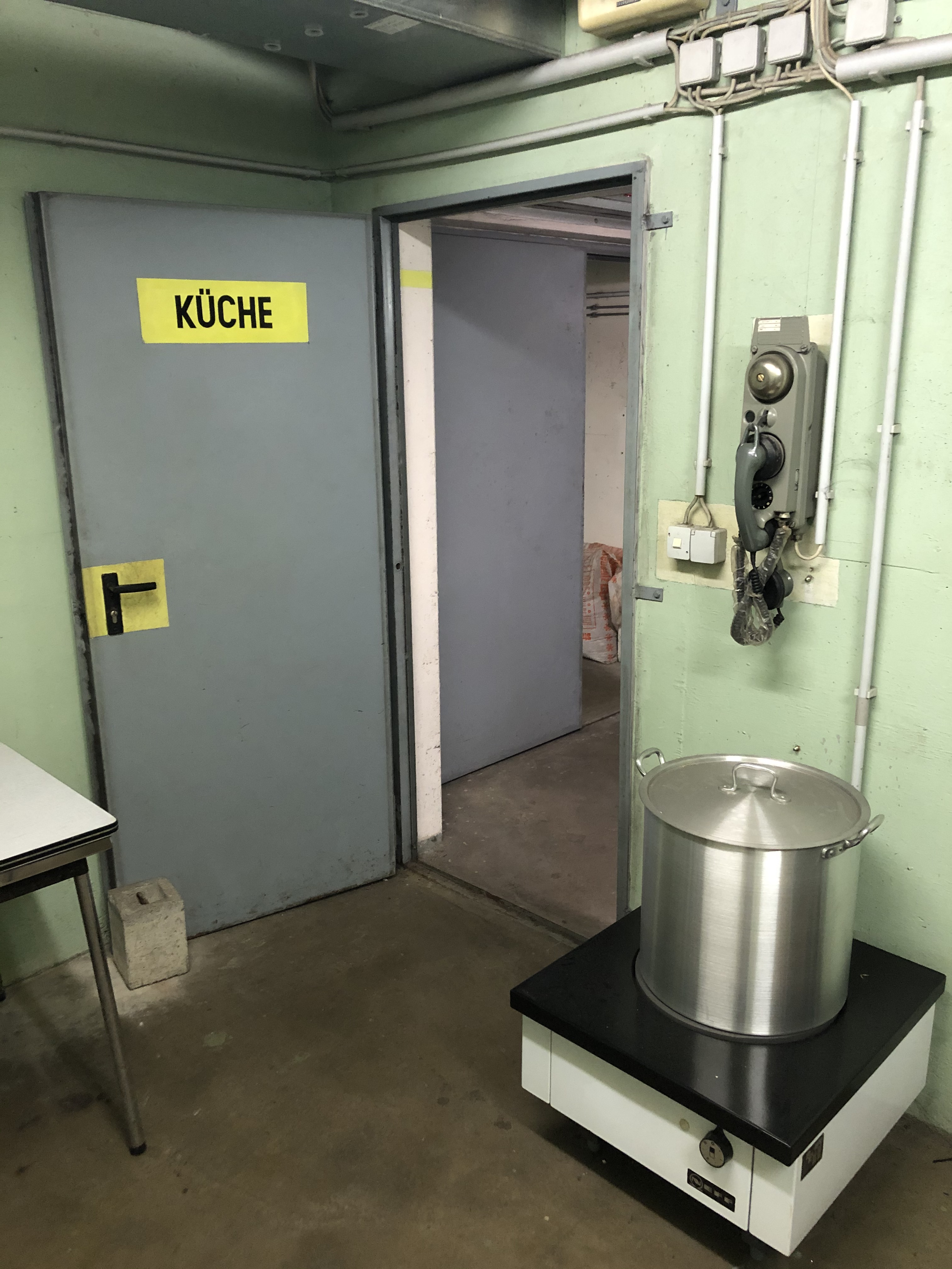 Mehrzweckanlage Sedanplatz Küche